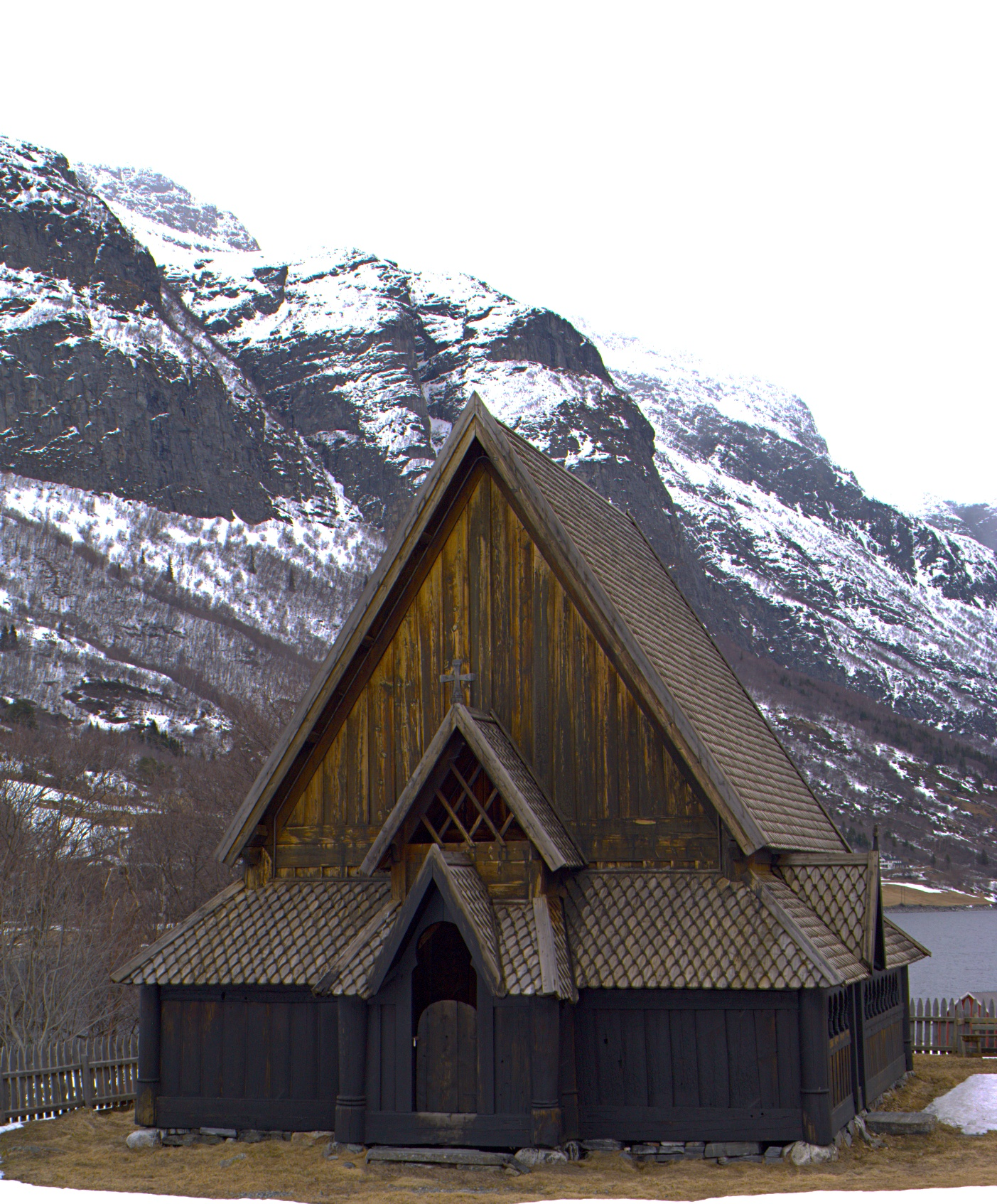 Øye stavkirke